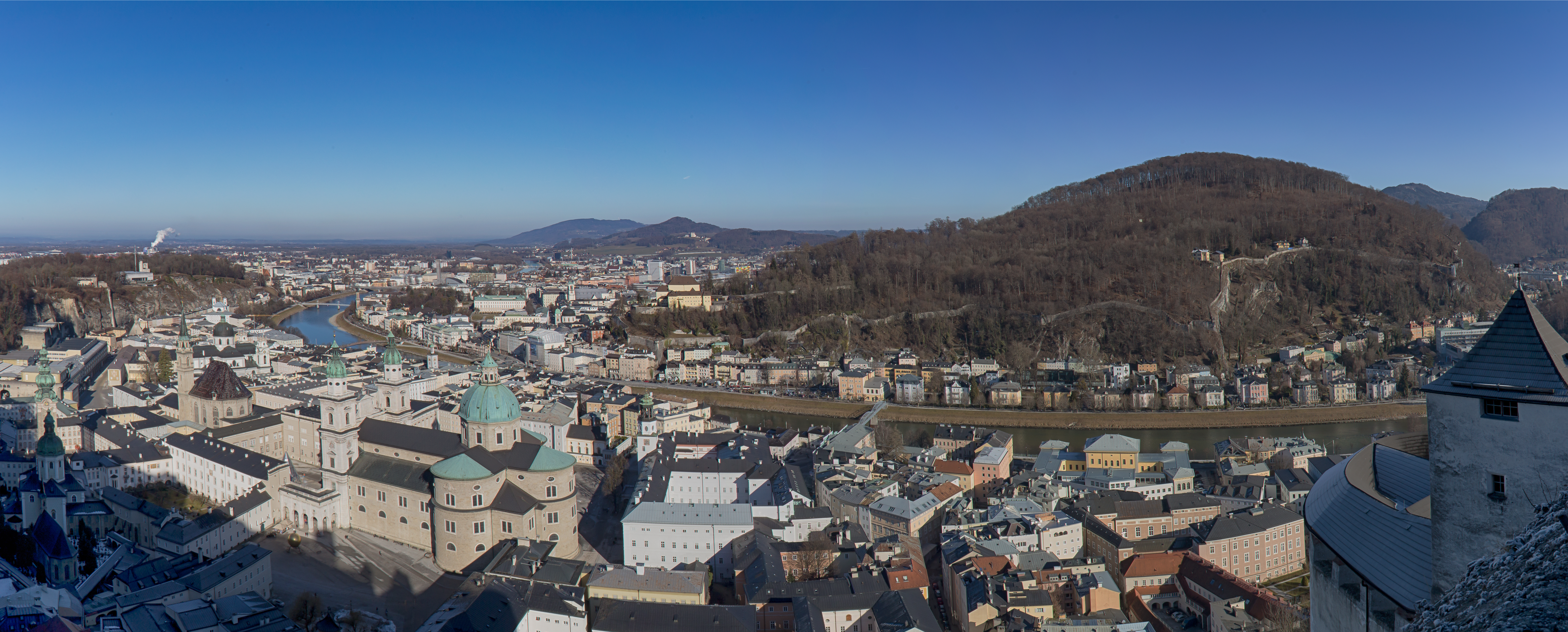 Blick von der Hohensalzburg nach Nordnordwesten bis Ostnordosten auf Salzburg mit der nach Norden abfließenden Salzach; links der Mitte bis rechts die Berge Haunsberg (835 m), Hochgitzen (676 m), Plainberg (549 m) und Kapuzinerberg (636 m).Im linken Vordergrund der Salzburger Dom.